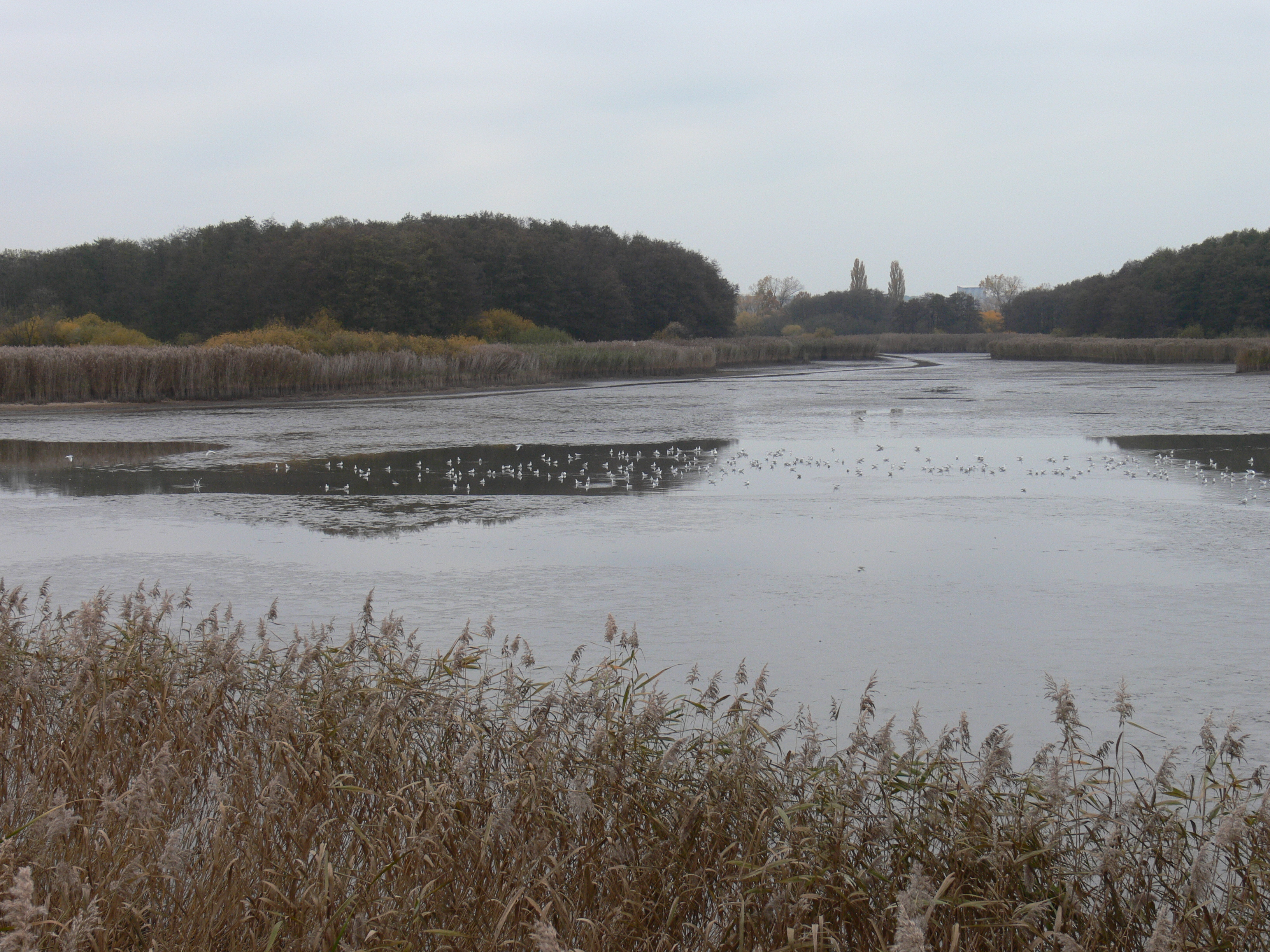 fotografie z pozorovatelny